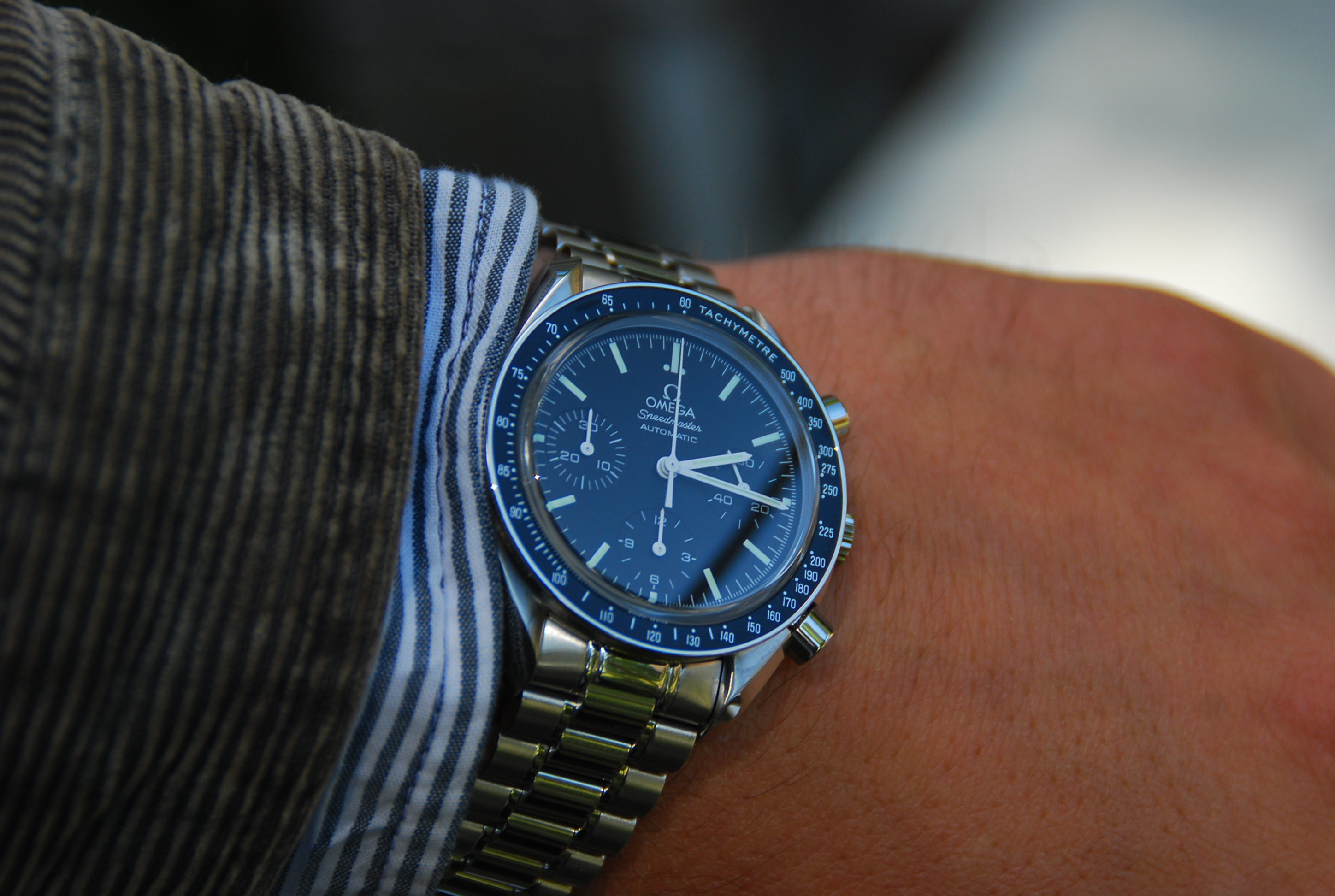 Die Omega Speedmaster Automatic ("reduced")